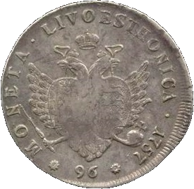 Ливонез. Монета для Прибалтийских провинций России Лифляндии и Эстляндии. 96 Копеек 1757 г. Серебро, 26,67 гр. Реверс.